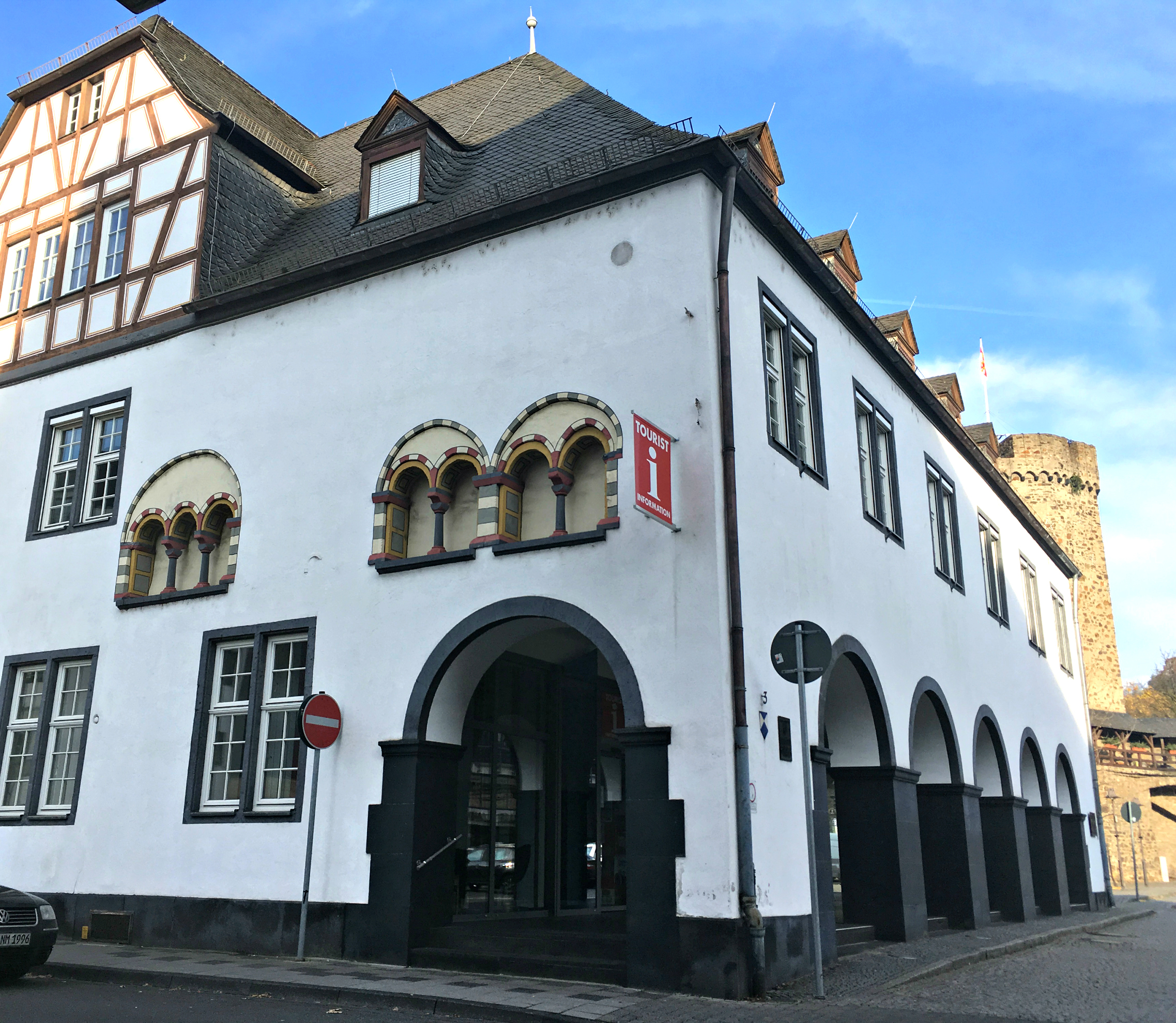 Salhof in Oberlahnstein, in seinen Ursprüngen auf die 2. Hälfte des 12. Jahrhunderts zurückgehend